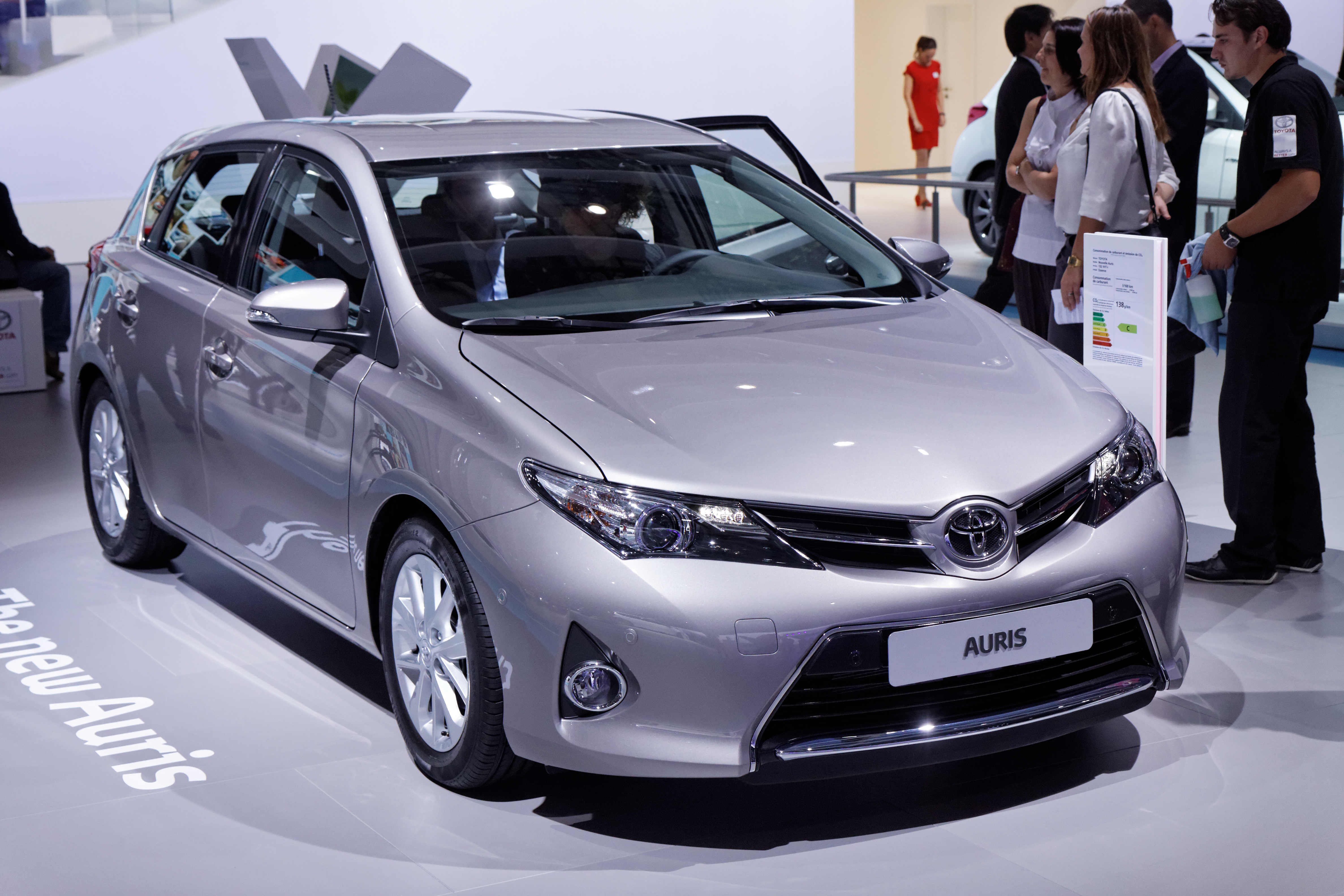 Une Toyota Auris présentée lors du Mondial de l'Automobile de Paris 2012.